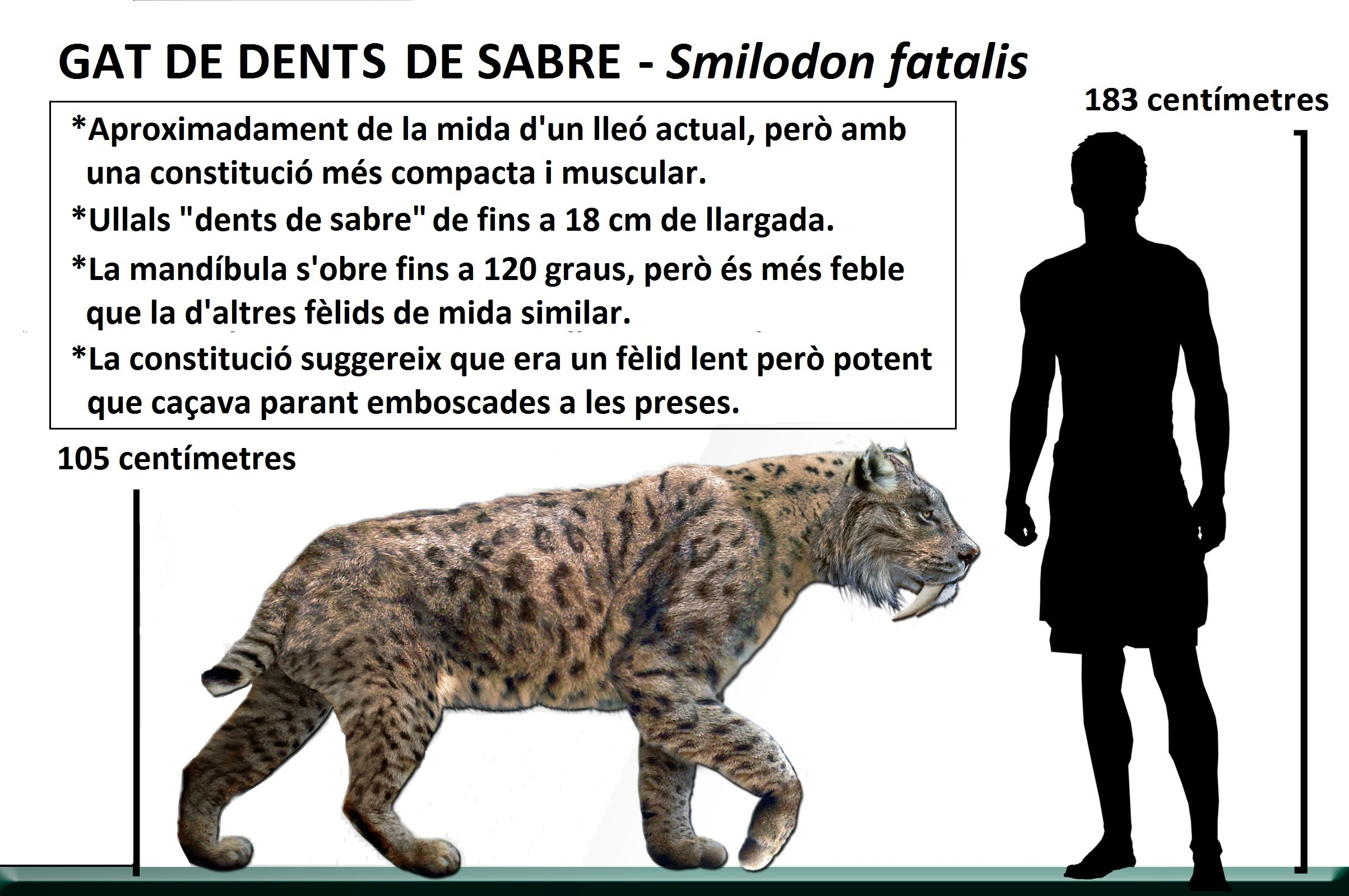 Recreació de Smilodon fatalis